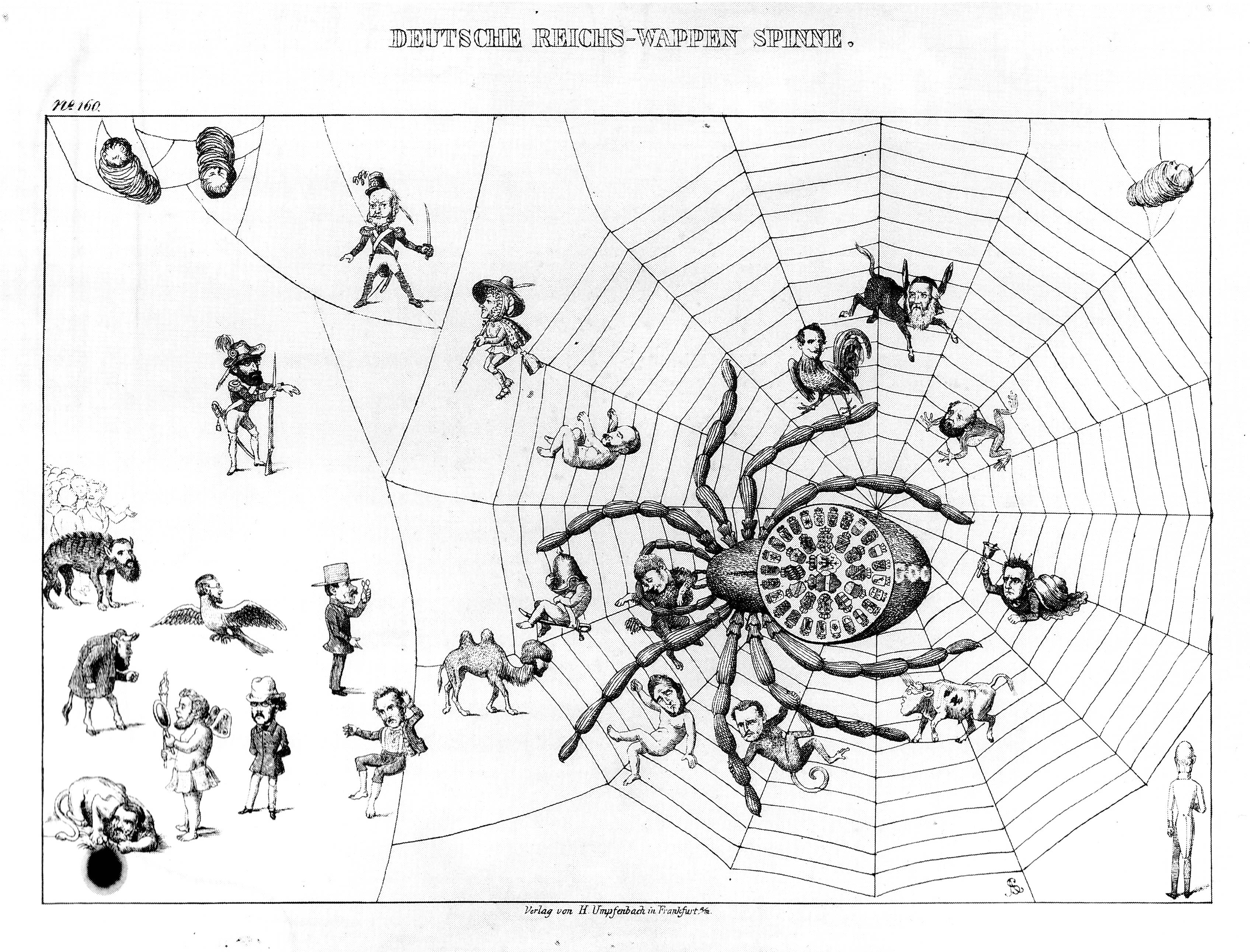 Lithographie von Adolph Schrödter. “Deutsche Reichs-Wappen Spinne”. Die Spinne mit den Wappen der deutschen Bundesstaaten hat bereits die Kleindeutsch-Erbkaiserlichen wie Johann Heckscher und Eduard Peucker eingefangen, außerhalb des Netzes befinden sich noch die Republikaner.